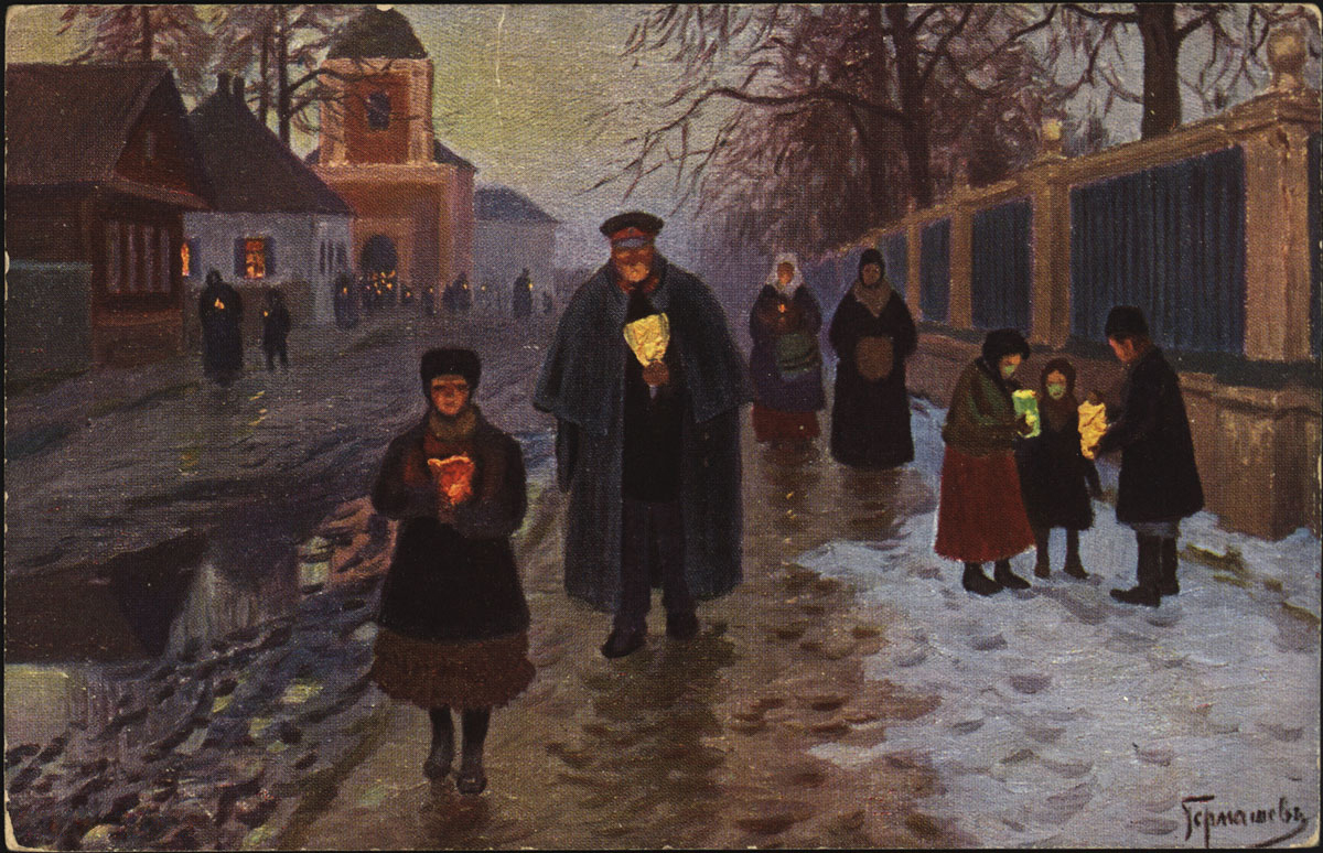 Пасхальная открытка "После заутрени". Между 1904-1914 гг. Михаил Маркианович Гермашев. Издательство "Ленц и Рудольф", Рига. Российская национальная библиотека, Санкт-Петербург